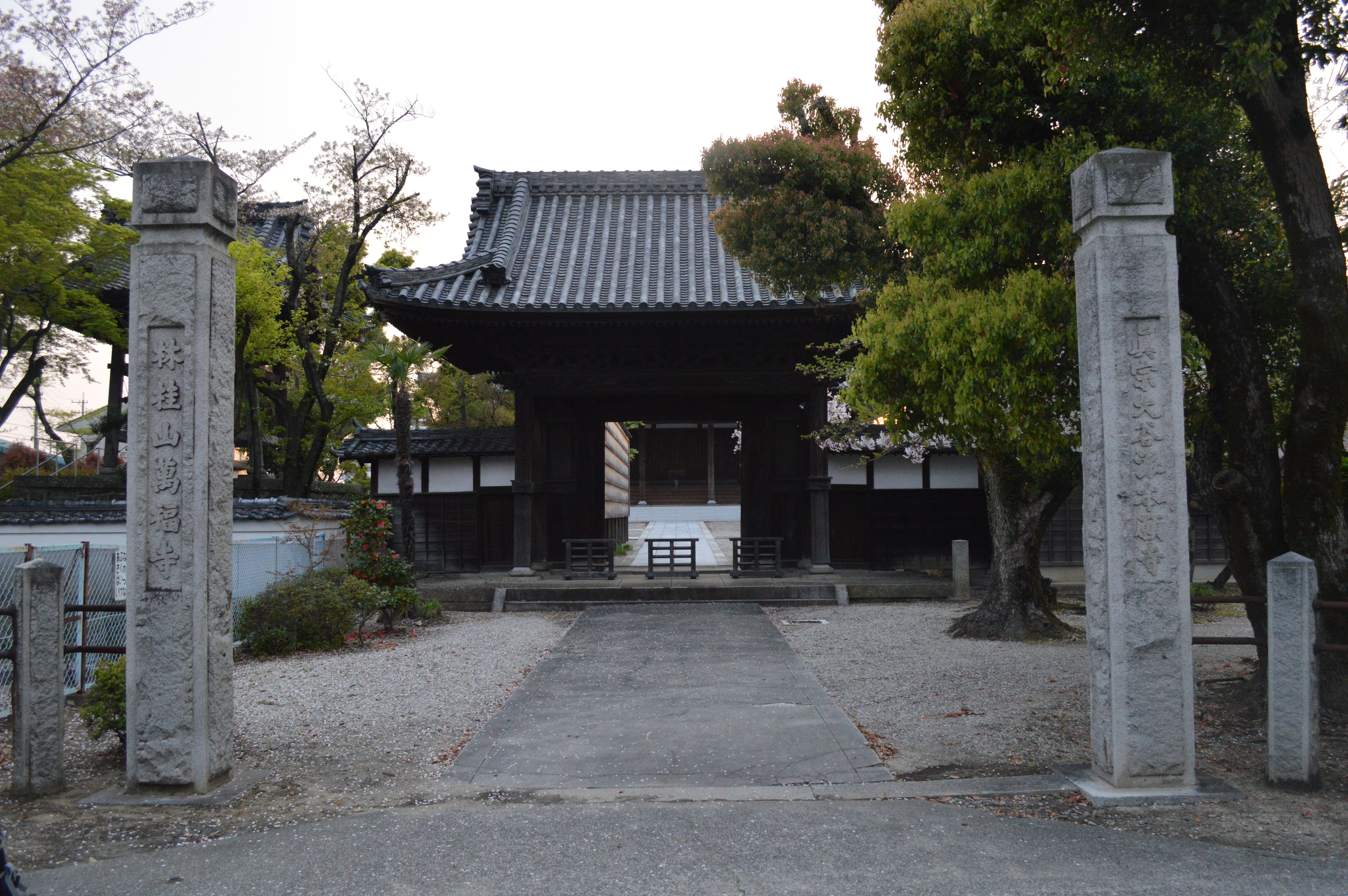 愛知県知立市 万福寺（萬福寺）